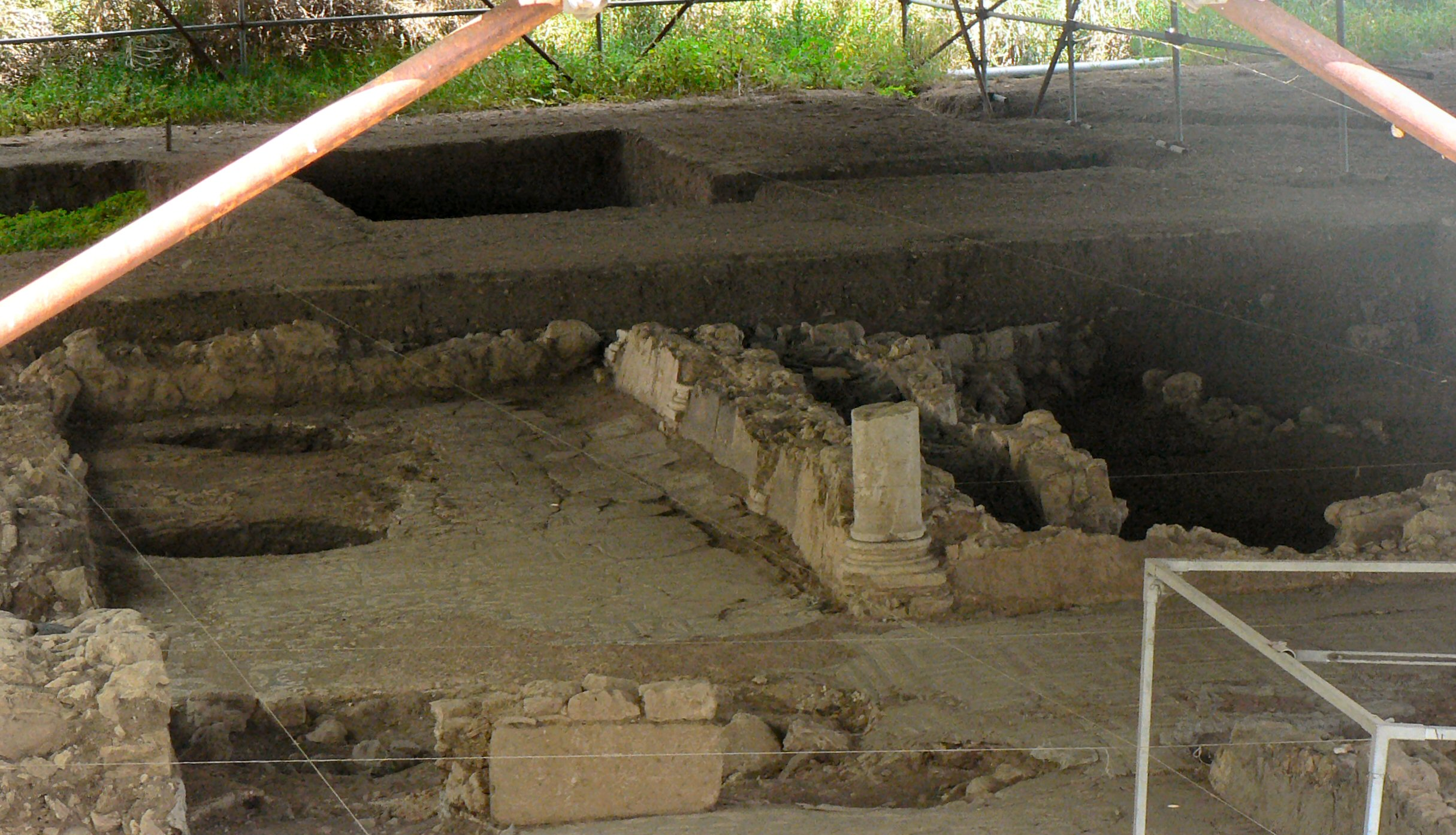 Vila Romana de Frielas